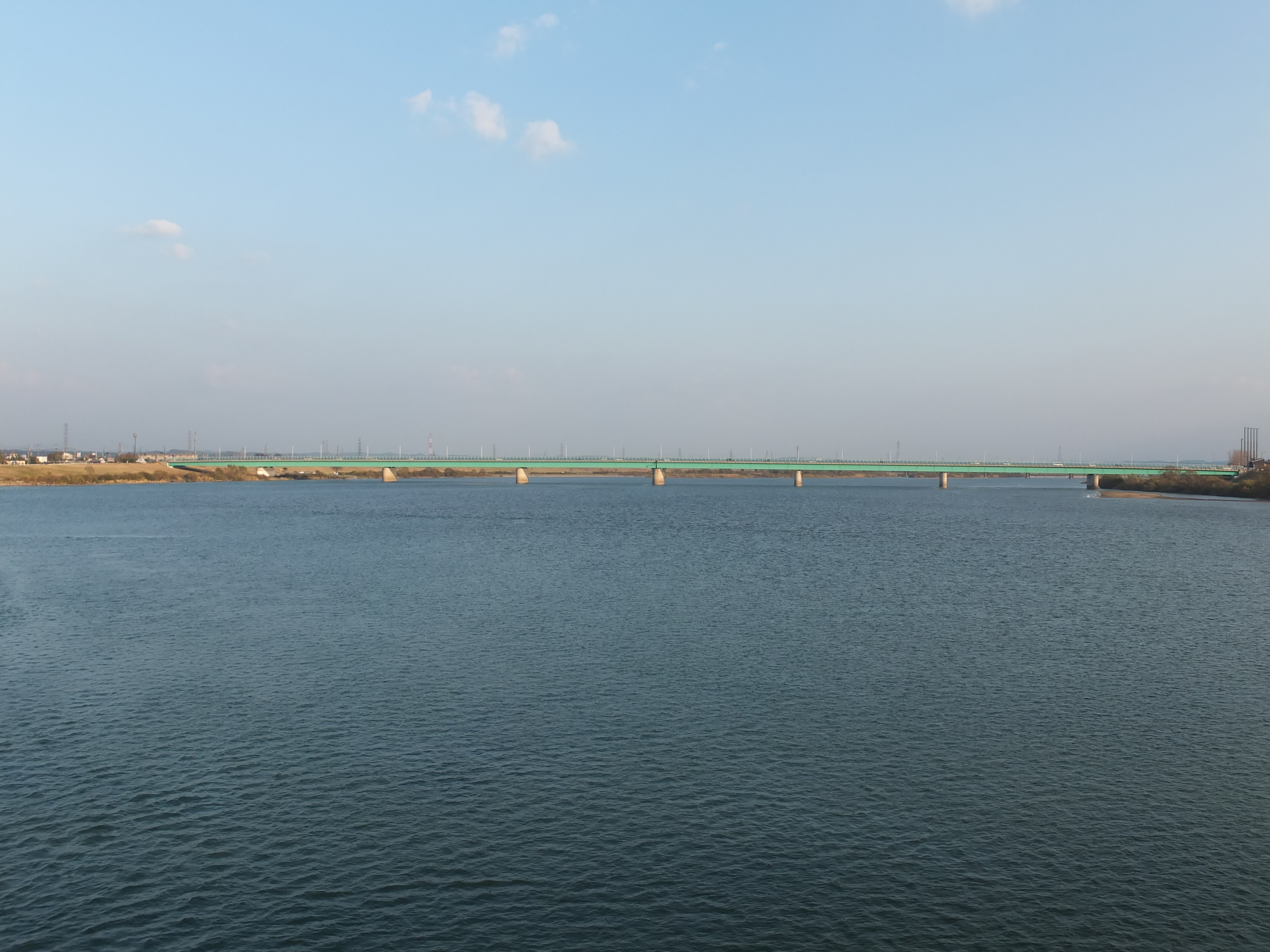 雄物新橋から見た秋田大橋全景